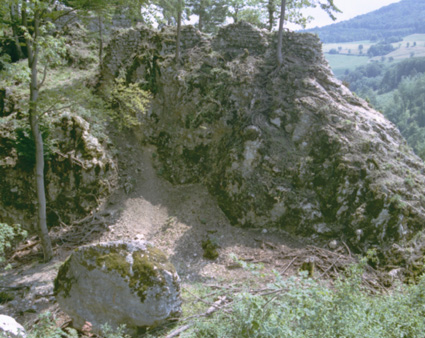 Ehemaliger Zugang zur Ruine Frohberg - Tschoepperli